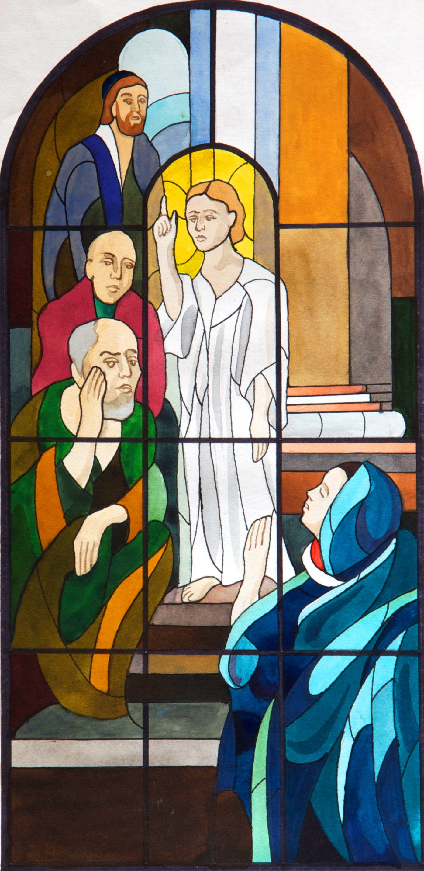 Jeden z witraży w kościele w Bączalu Dolnym, autorstwa Zygmunta Czyża